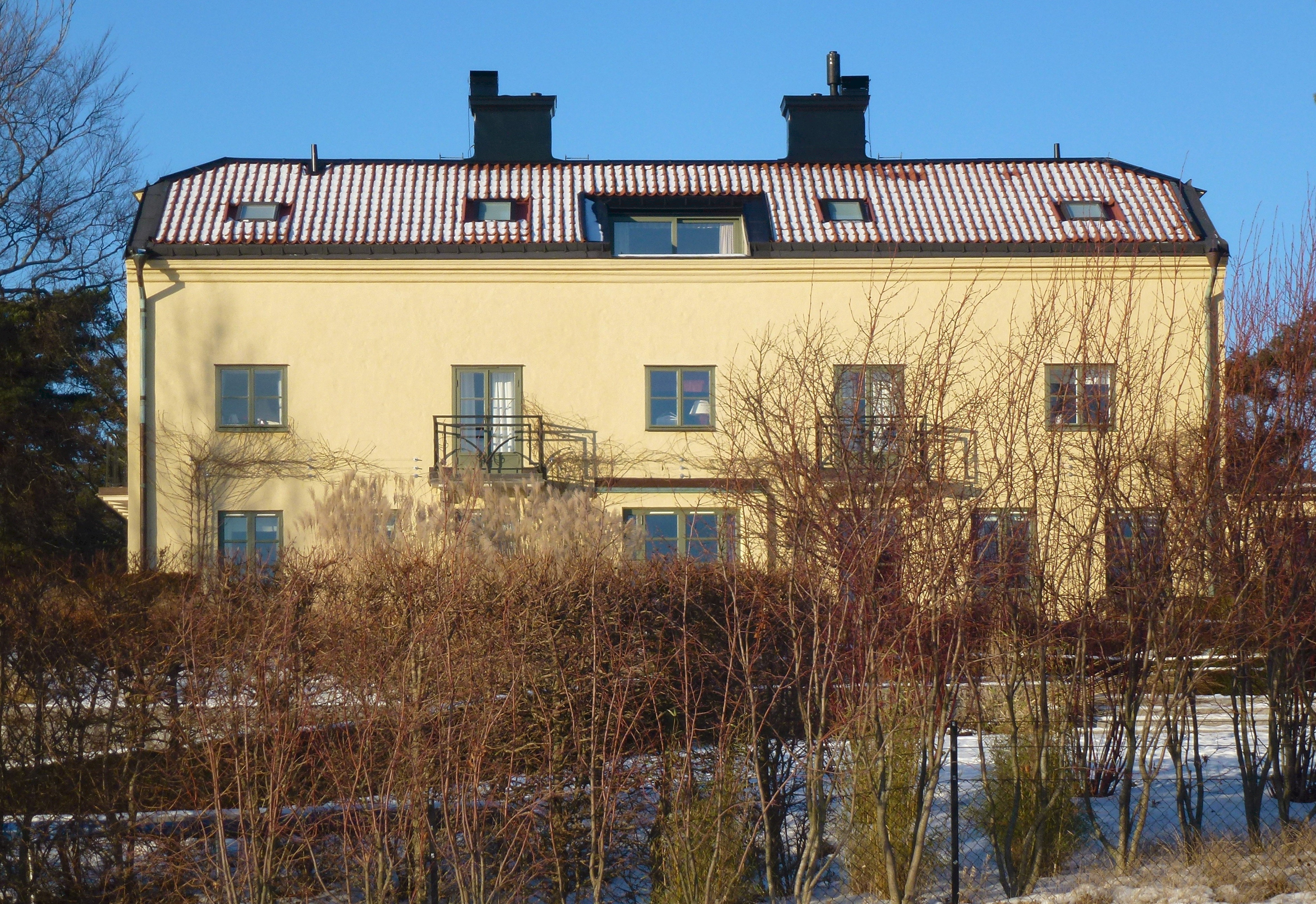 Grimbergs Villa, Fyrstigen 1 / Strandvägen 36, Djursholm, arkitekt Carl-Otto Hallström